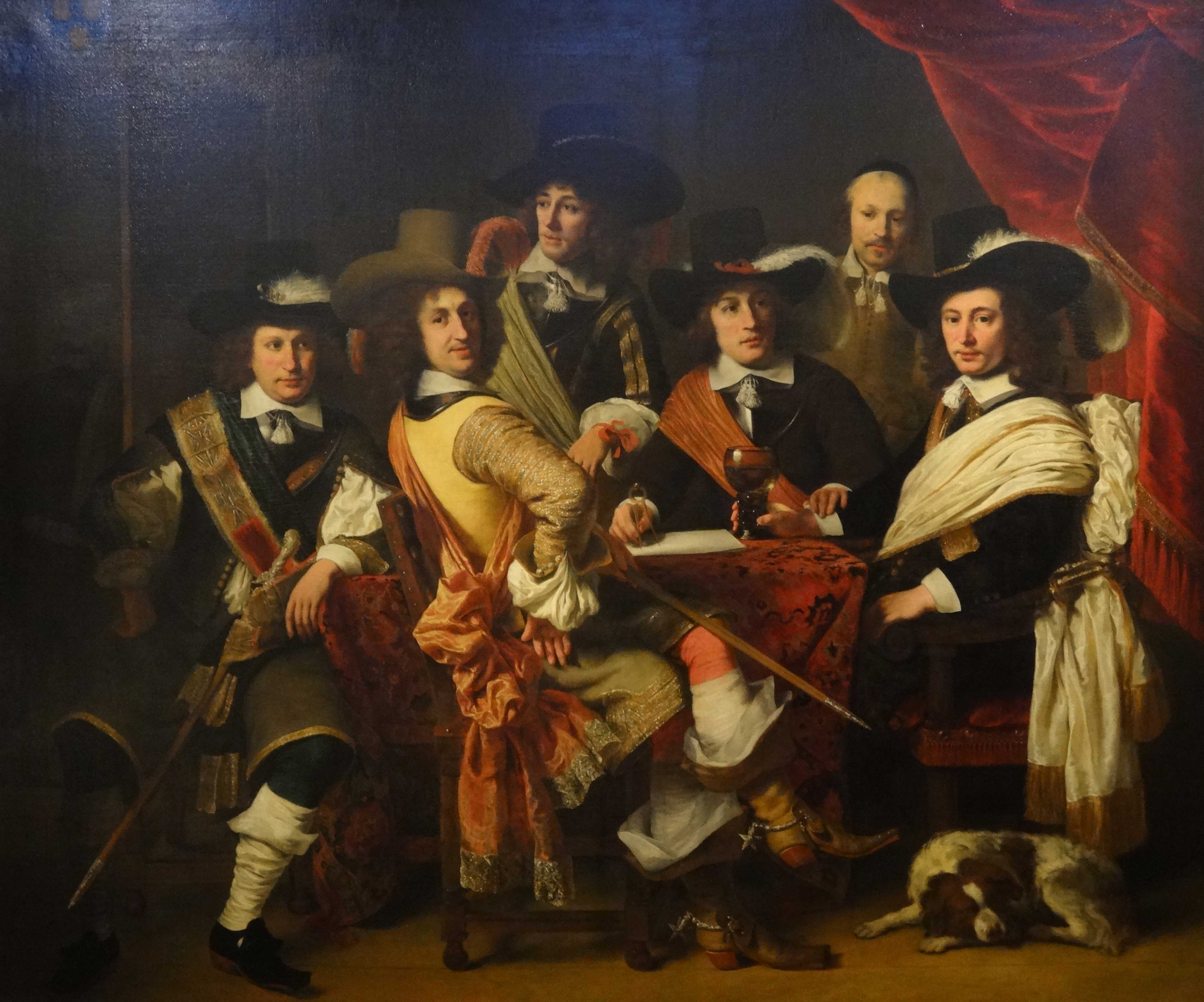 Schuttersstuk, schutterij onder leiding van kolonel Govert Suystitle QS:P1476,nl:"Schuttersstuk, schutterij onder leiding van kolonel Govert Suys" label QS:Lnl,"Schuttersstuk, schutterij onder leiding van kolonel Govert Suys"